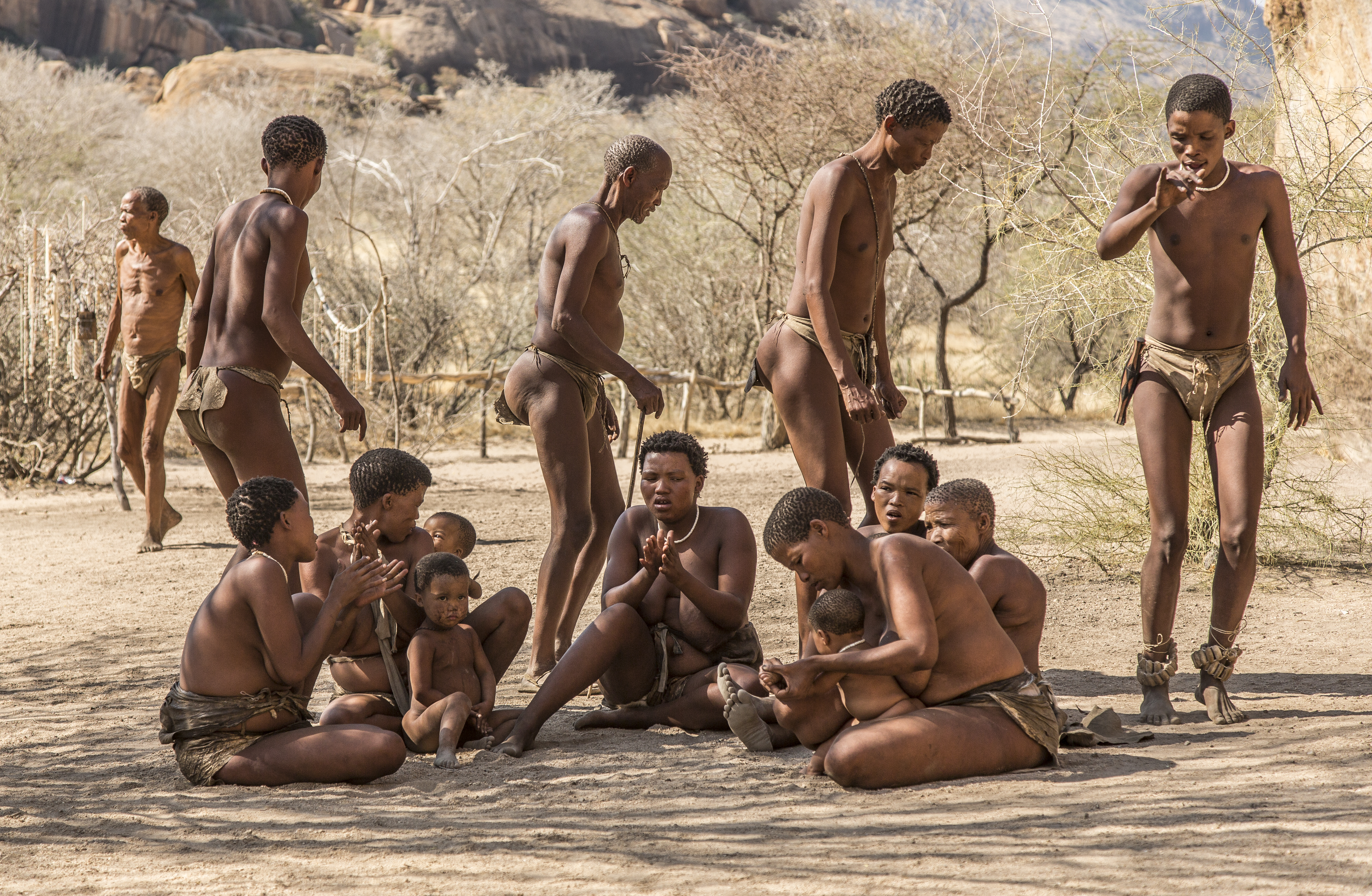 Buschmänner in Namibia